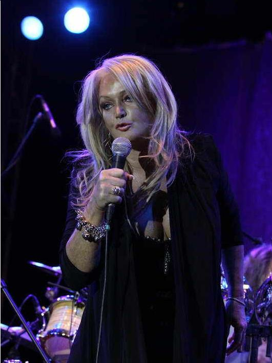 Bonnie Tyler győri a koncertjén.